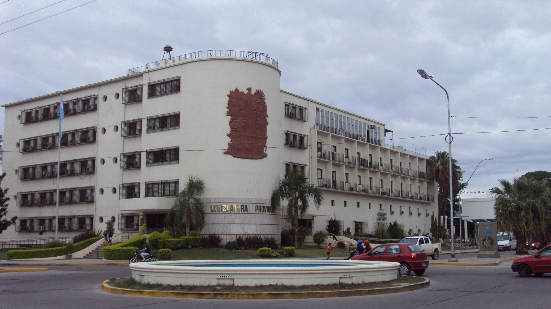 Edificio de la Legislatura de la Provincia de San Juan, Argentina. Inaugurado en 1952 como el Hotel Eva Perón, y reinaugurado en 1984 como edificio legislativo.